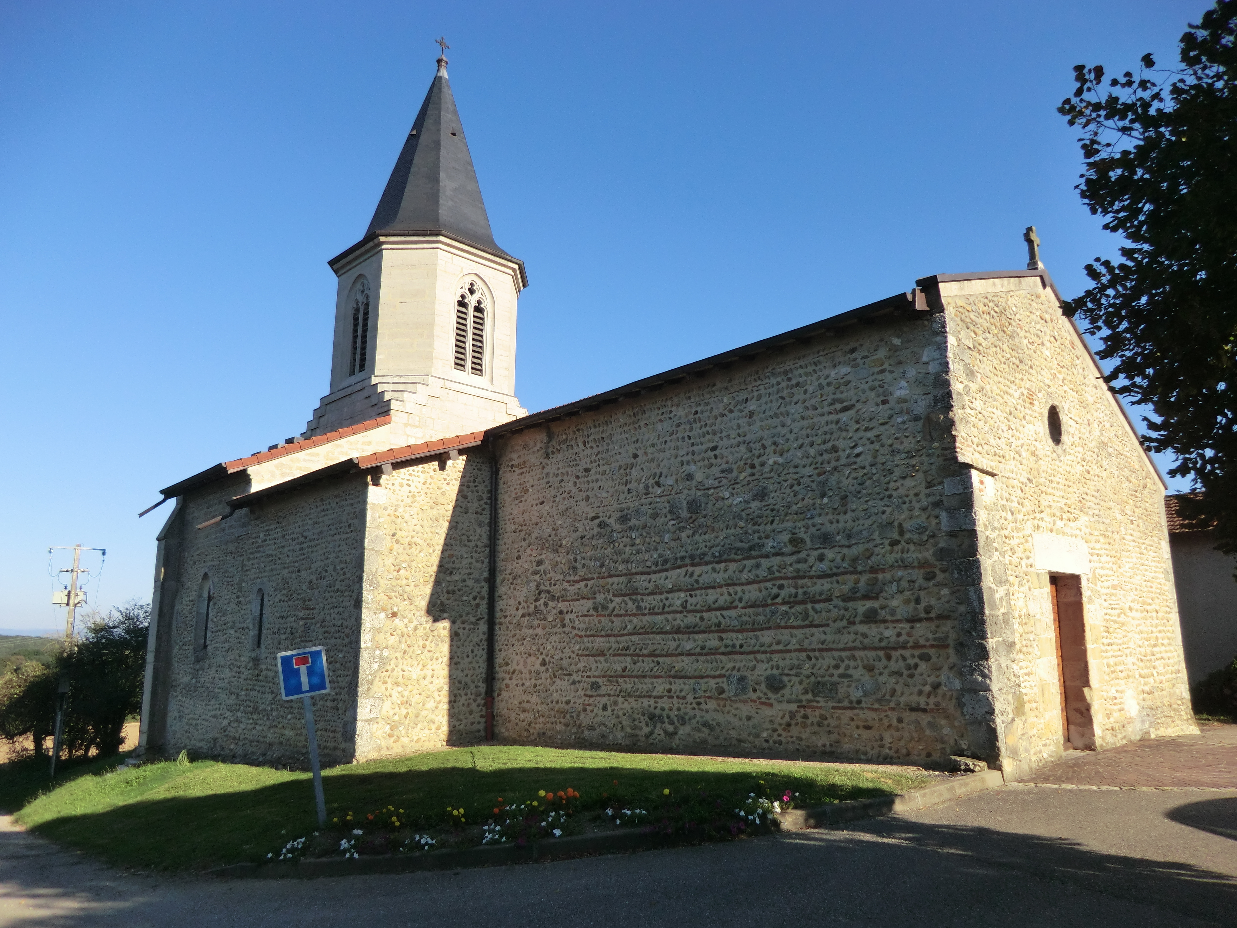 Église Sainte-Eulalie de Saint-Éloi (Ain).